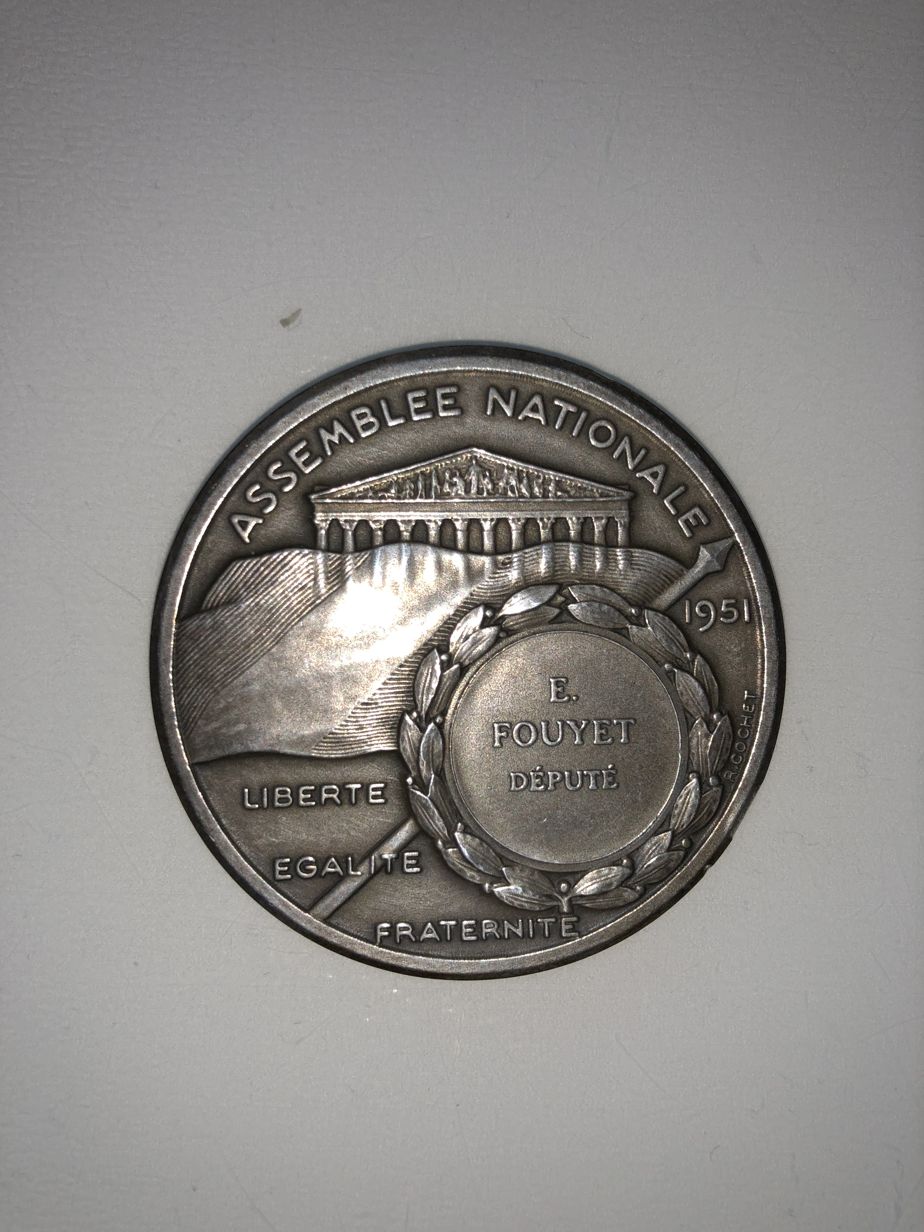 Médaillon d'Emmanuel Fouyet attestant de son élection en tant que député du Finistère en 1951.